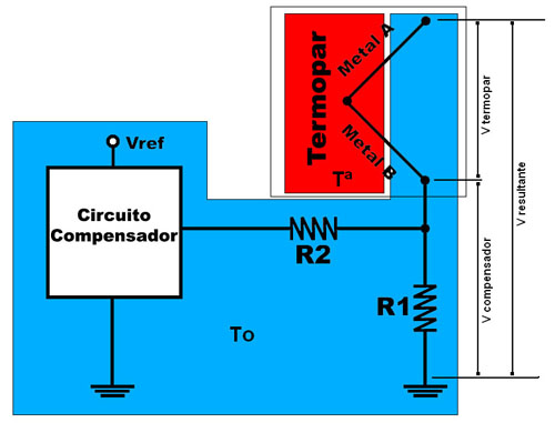 Sistema basico de compensacion de union fria